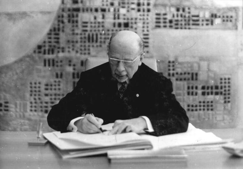 Zentralbild Junge 8.4.1968 Berlin: Neue Verfassung der DDR Feierlicher Staatsakt im Amtssitz des Staatsrates am 8.4.1968. In einem festlichen Staatsakt im Amtsstiz des Staatsrates der DDR nahm der Vorsitzende des Staatsrates der DDR, Walter Ulbricht, in Anwesenheit führender Persönlichkeiten des Bericht der Zentralen Abstimmungskommission über das Ergebnis des Volksentscheides entgegen und verkündete feierlich die durch das Volk am 6. April beschlossene Verfassung der DDR. Auf unserem Foto: Walter Ulbricht unterzeichnet die neue Verfassung der DDR.